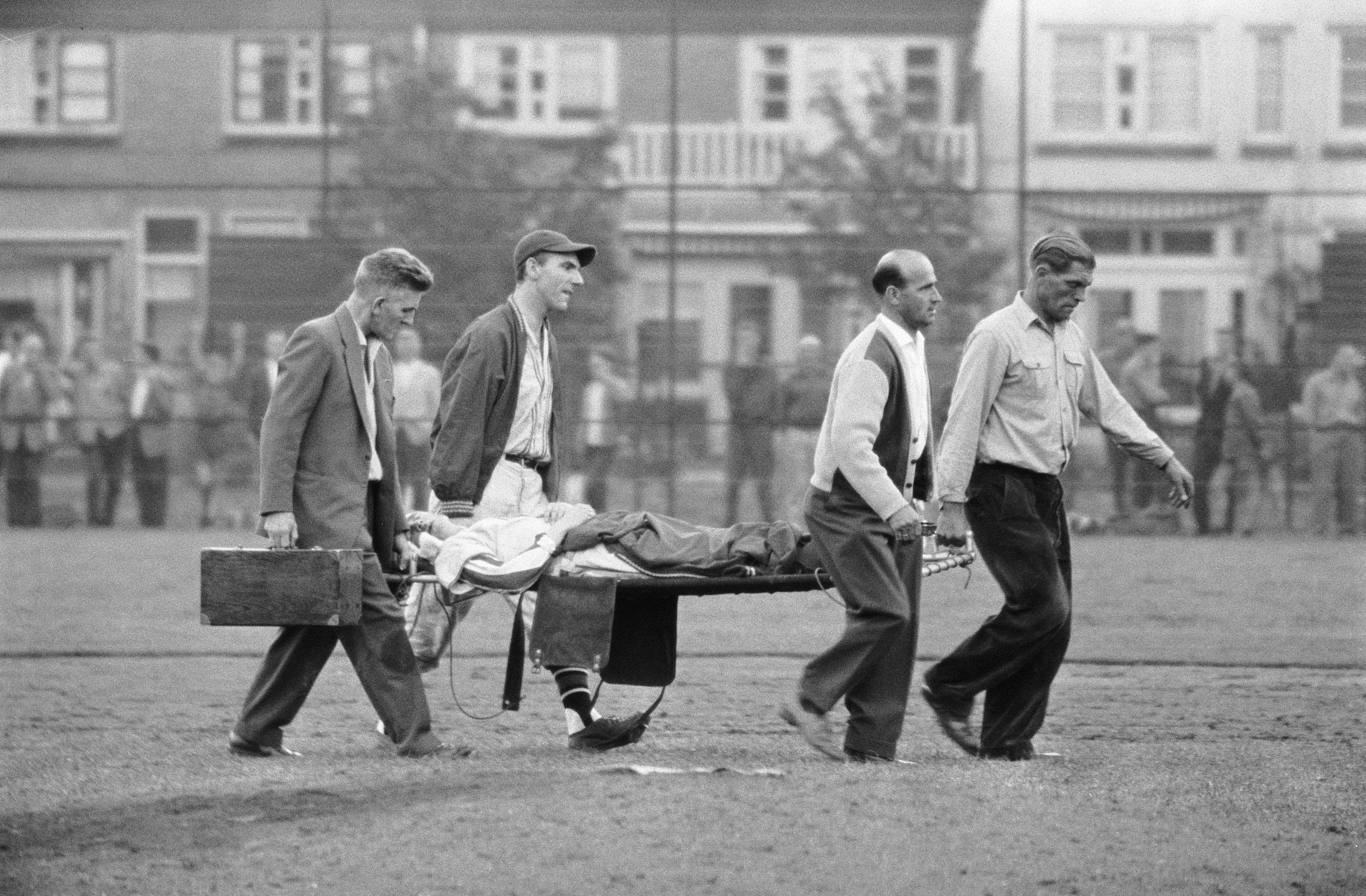 Collectie / Archief : Fotocollectie Anefo Reportage / Serie : [ onbekend ] Beschrijving : Honkbal. Schoten tegen Sparta 3-2, Hendriks (Sparta) wordt weggedragen Datum : 27 augustus 1960 Locatie : Haarlem Trefwoorden : honkbal, sport Persoonsnaam : Hendriks, [...] Instellingsnaam : Sparta Fotograaf : Bilsen, Joop van / Anefo Auteursrechthebbende : Nationaal Archief Materiaalsoort : Negatief (zwart/wit) Nummer archiefinventaris : bekijk toegang 2.24.01.05 Bestanddeelnummer : 911-5371